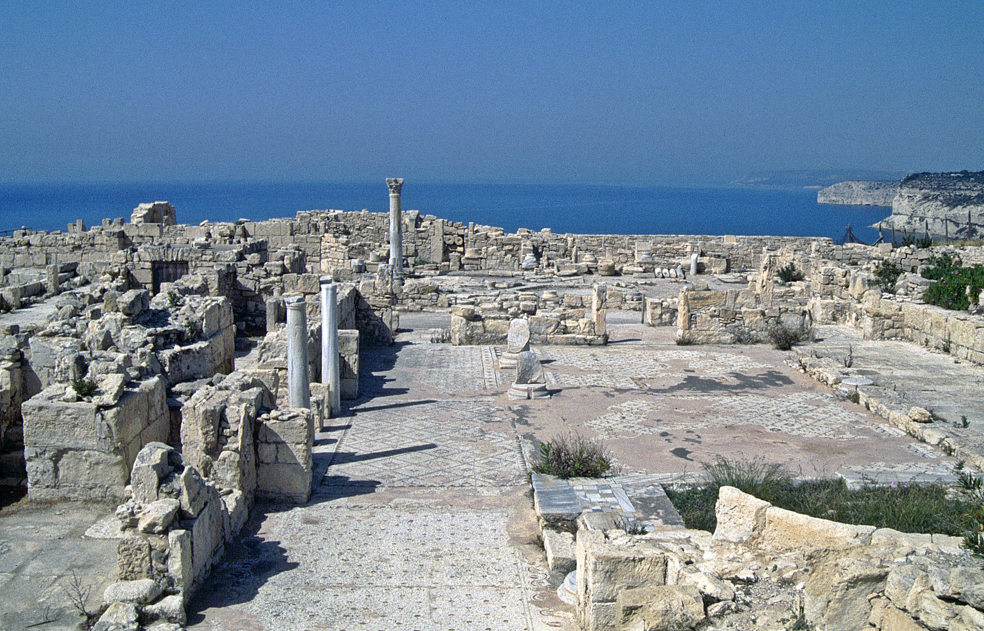 Kourion: Akropolis mit frühchristlicher Basilika